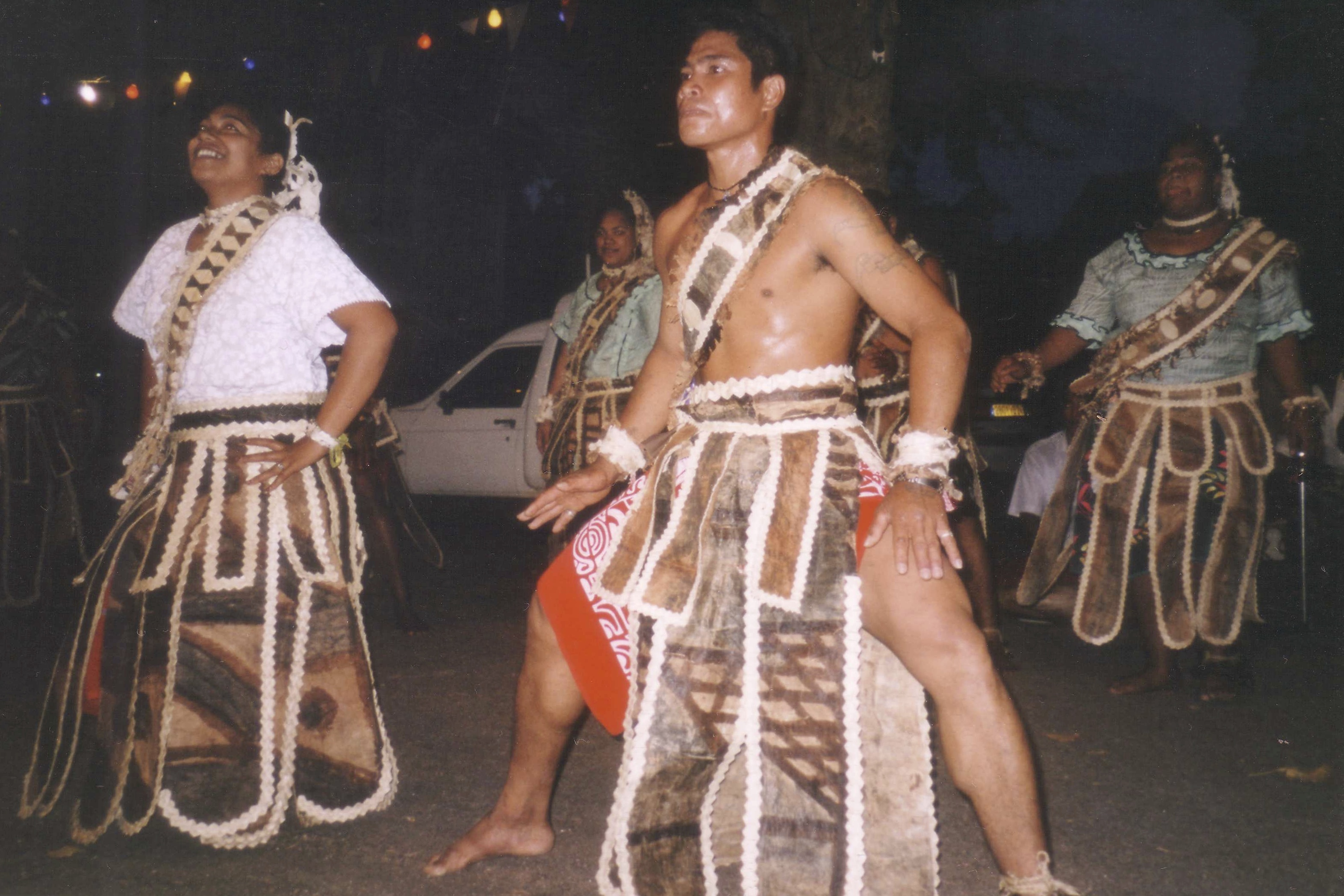 Festival de Confolens 2005 - Ensemble Folklorique « Lupe O Sigave » de Futuna